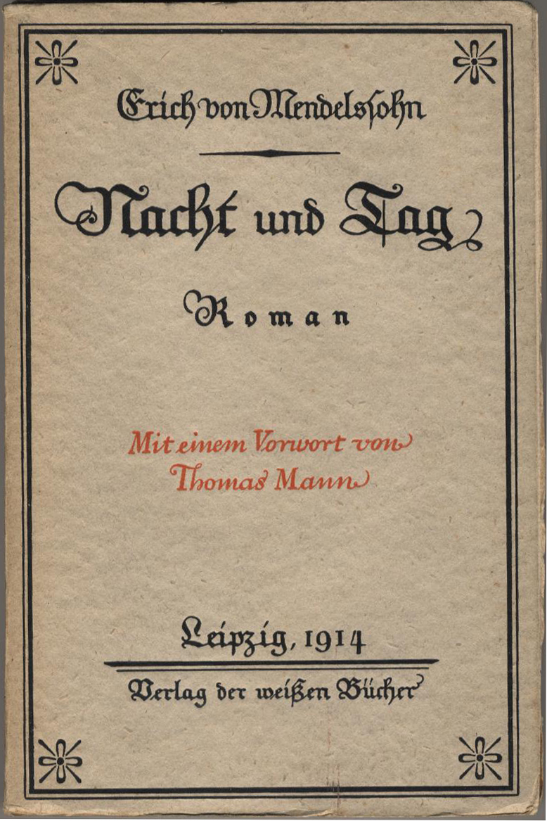 Buchcover der Erstausgabe von Erich von Mendelssohn: "Tag und Nacht" mit einem Vorwort von Thomas Mann, 1914